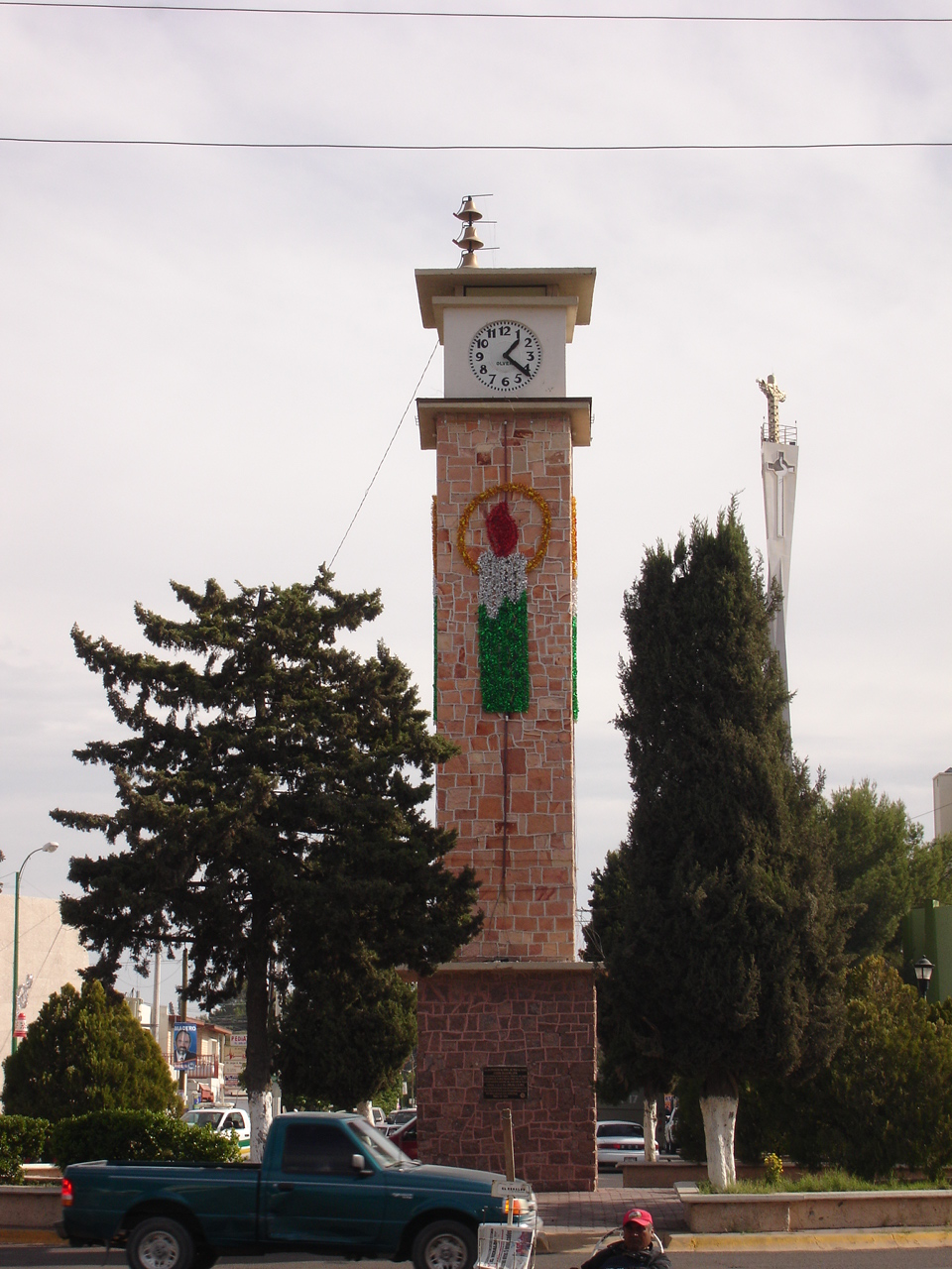 Reloj de Cd. Delicias, Chih. Material propio.